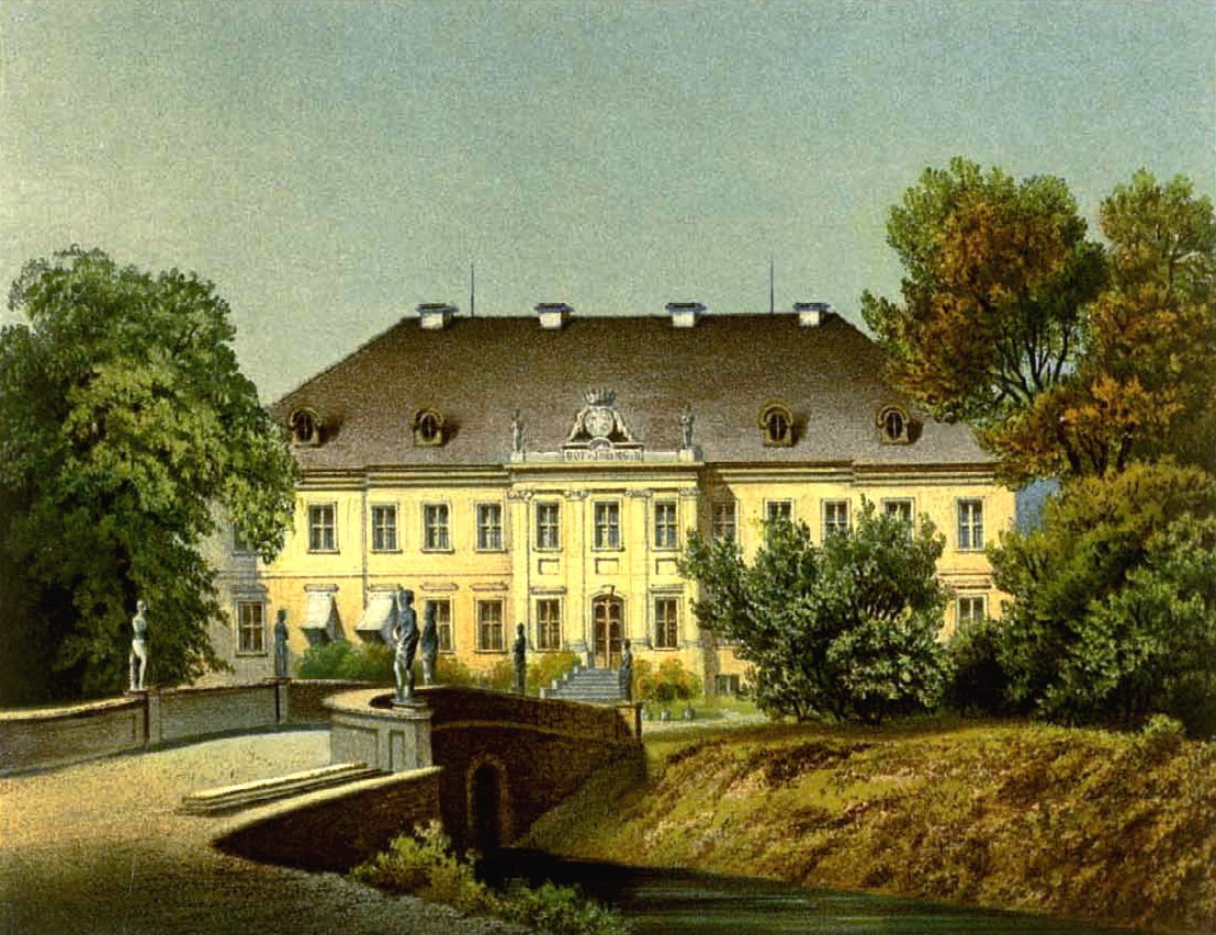 Schloss Rühstädt, Kreis West-Prignitz, Lithografie aus dem 19. Jahrhundert